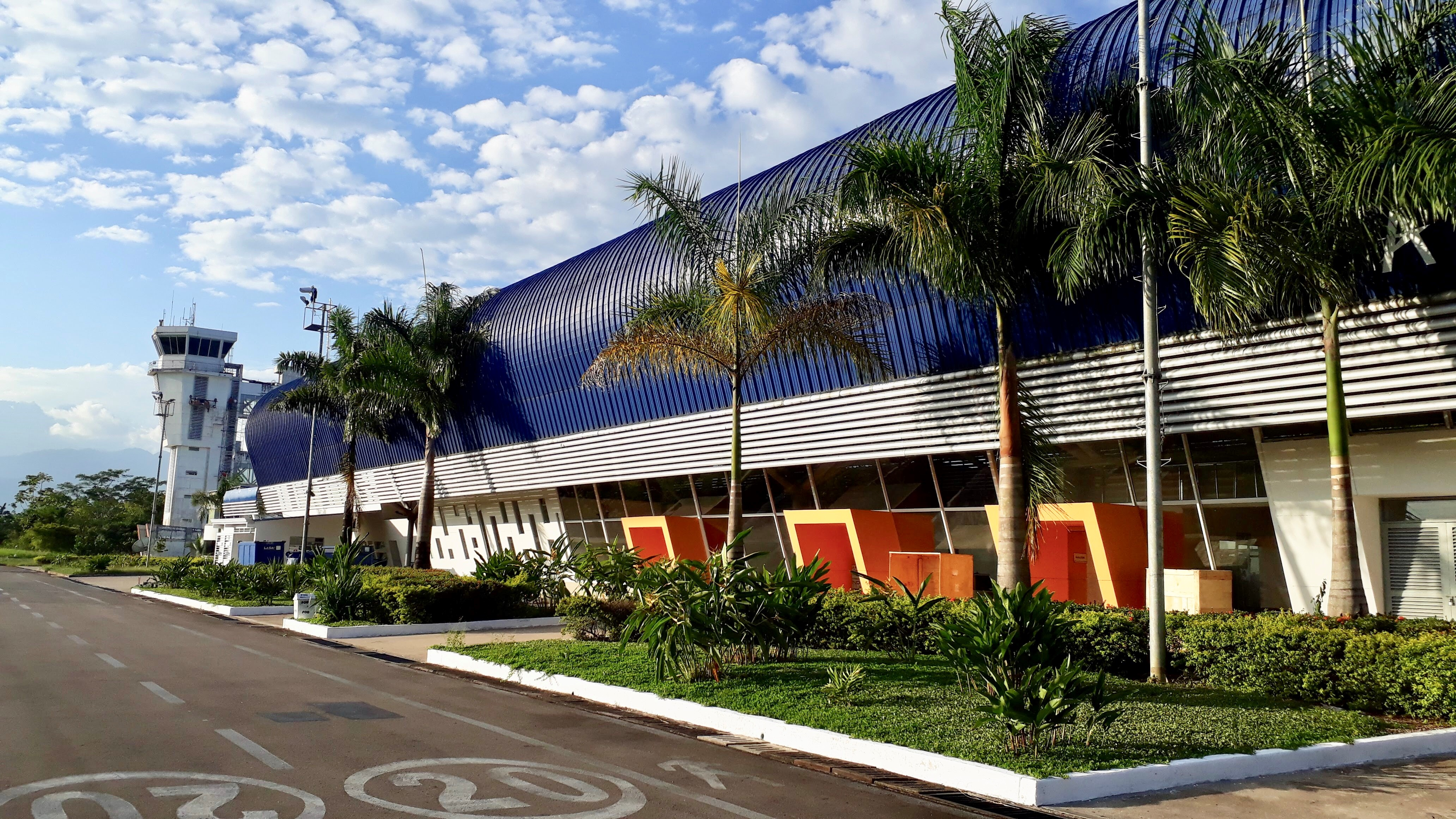 Fachada lado aire del aeropuerto Gustavo Artunduaga de Florencia (FLA)